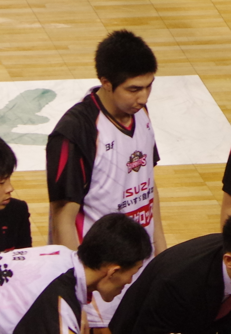 ｂｊリーグ 2013-2014シーズン プレイオフ ファイナルズ_026